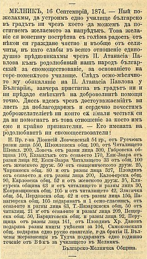 Дописка във вестник "Век", в която се съобщава за обиколката на Атанас Павлов от Мелник за събиране на помощи за българското просветно дело